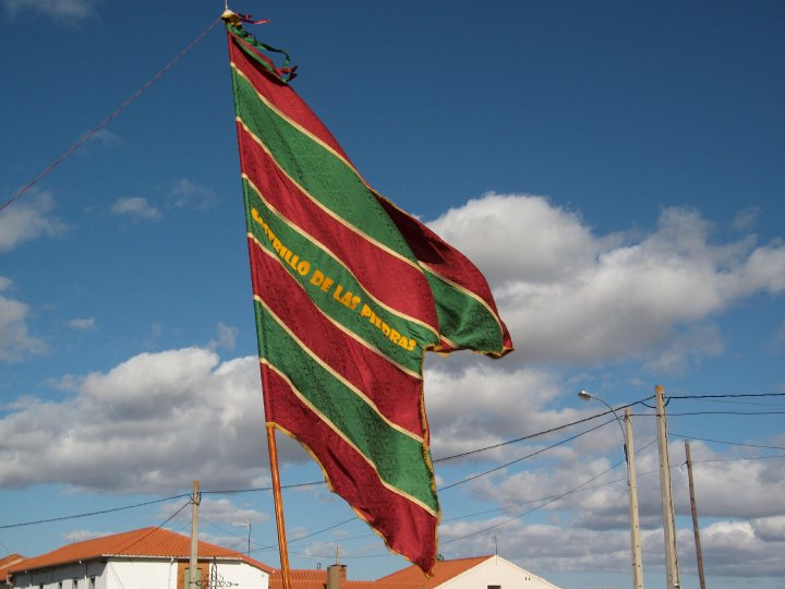 Foto del nuevo pendón de la localidad de Castrillo de las Piedras (Valderrey, León, España)